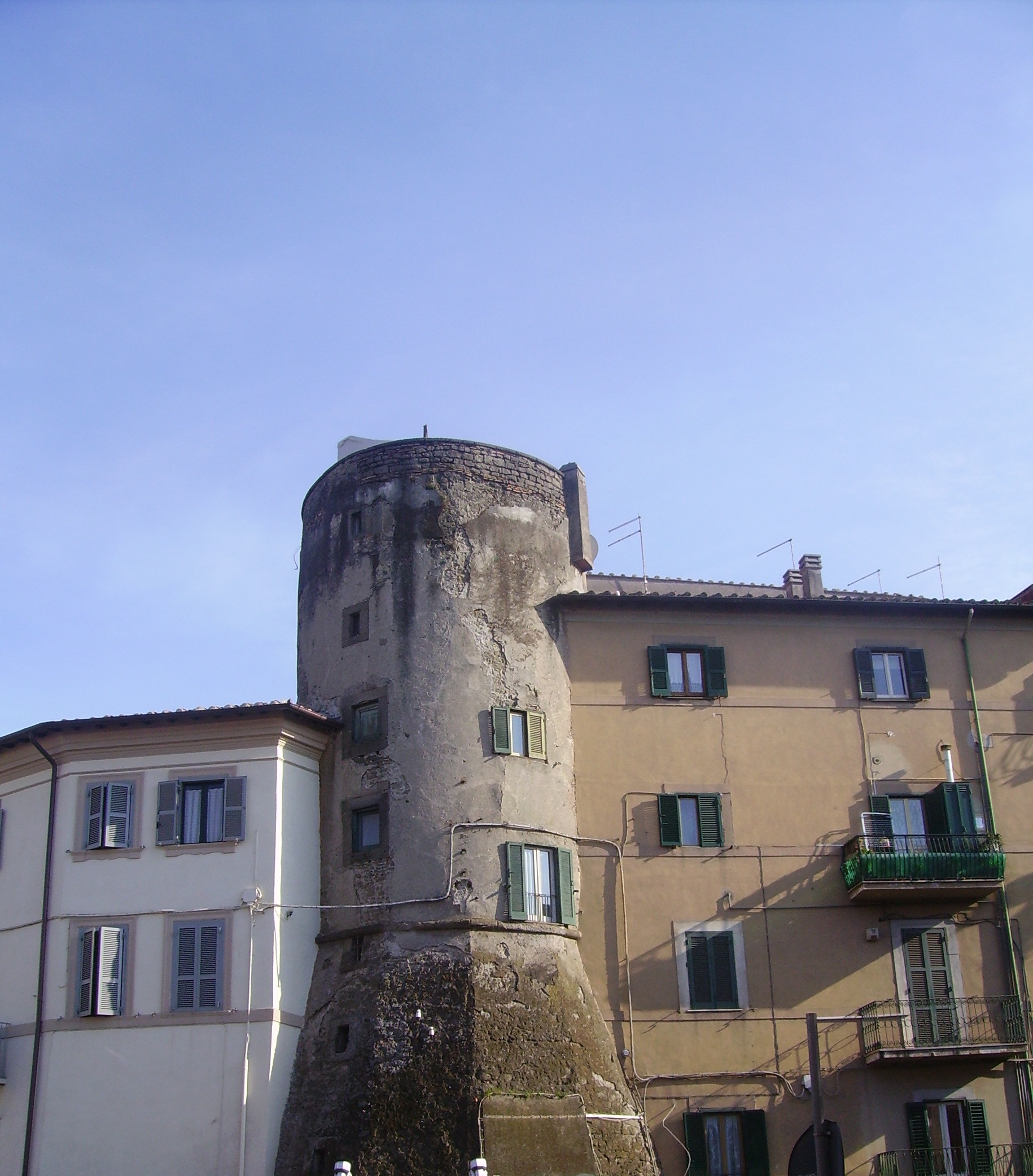 Torre di piazza Matteotti a Marino